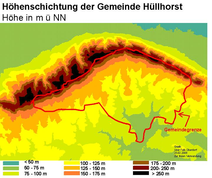 Physische Karte der Gemeinde Hüllhorst